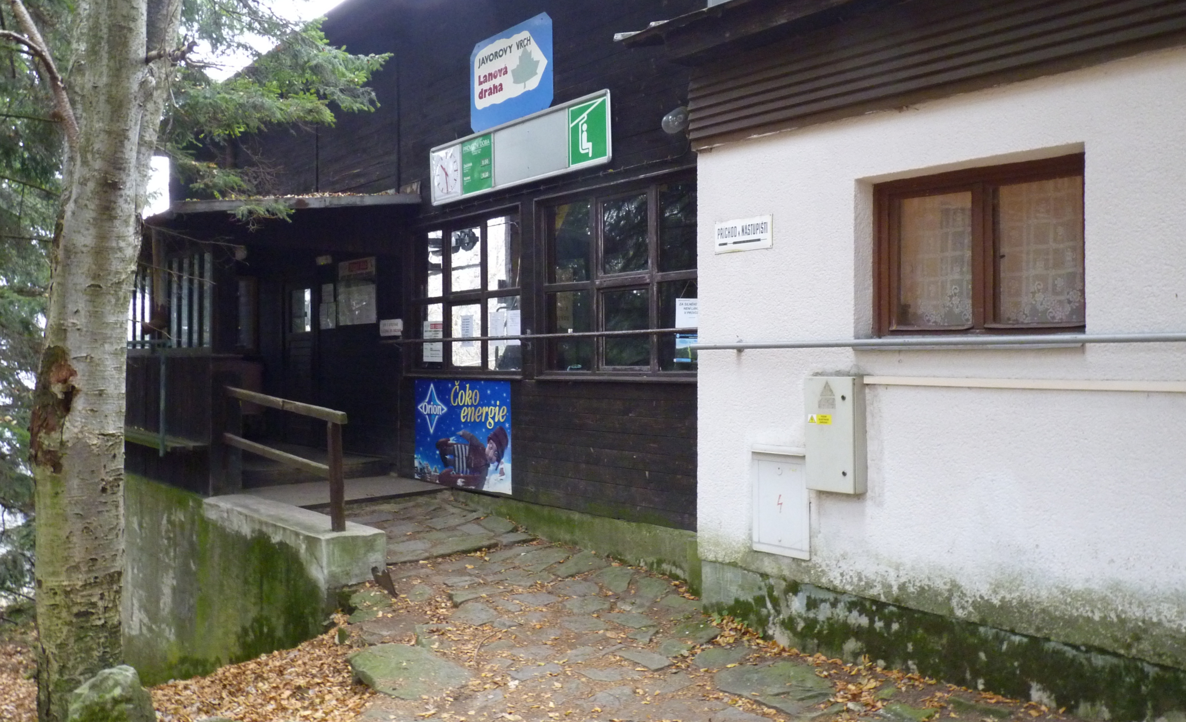 Lanová dráha Oldřichovice - Javorový vrch. Horní budova.